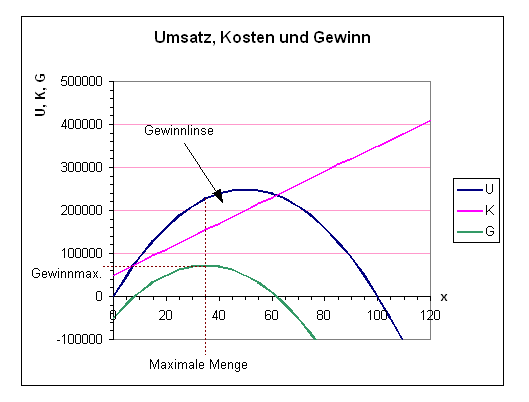 Abb. des Cournot-Punktes